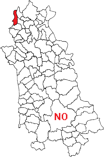 Mappa con posizione del comune nella provincia italiana di Novara